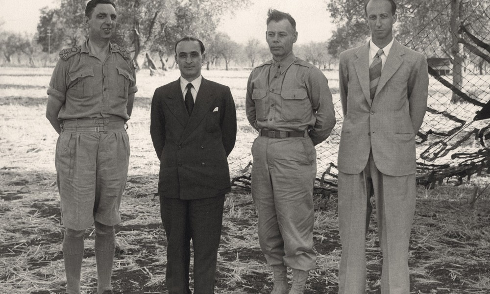 Cassibile (Siracusa), 3 settembre 1943. Dopo la firma dell'Armistizio fra l'Italia e le potenze alleate, posano per una foto nell'oliveto presso la tenda dove si è svolta la cerimonia. Da sinistra, il Brigadiere Generale inglese Kenneth Strong, il Generale italiano Giuseppe Castellano, il Generale statunitense Walter Bedell Smith (futuro direttore della CIA) e il diplomatico Franco Montanari, che aveva svolto le funziondi di traduttore e interprete per Castellano.